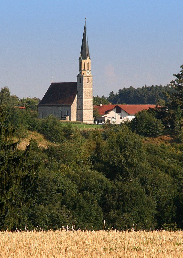 Die Wallfahrtskirche St. Mariä Himmelfahrt in Pietenberg (Gemeinde Taufkirchen, Landkreis Mühldorf am Inn, Oberbayern). Ein später teilweise veränderter gotischer Kirchenbau des 15. Jahrhunderts.